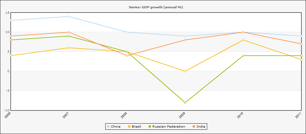 金砖四国GDP增长率（数据来自世界银行）